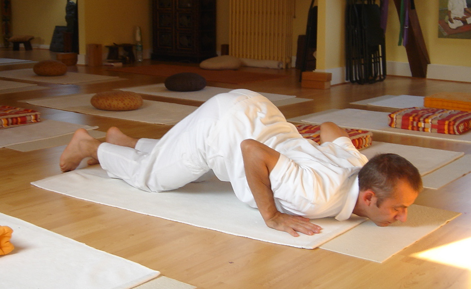 Yoga postures